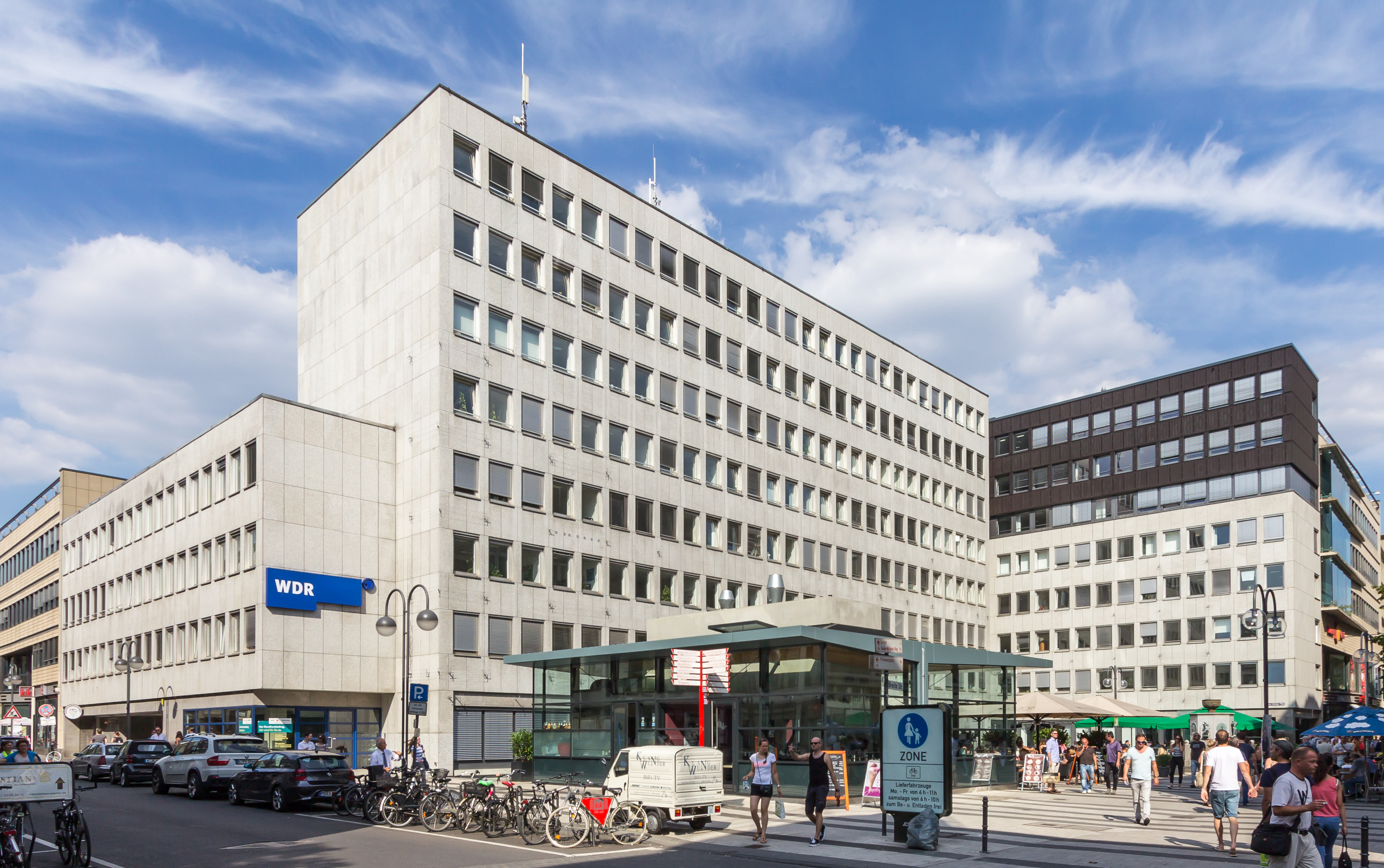 WDR Bürogebäude, Haus Berlich, Breite Straße 92–98. Im Vordergrund der Hanns-Hartmann-Platz, der an der Breite Straße angrenzt. Links die Straße Auf dem Berlich